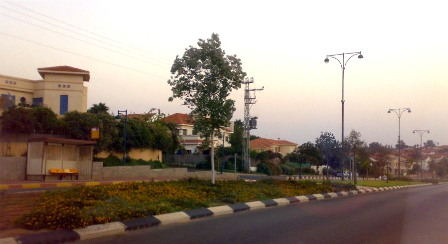 Kefar Jona